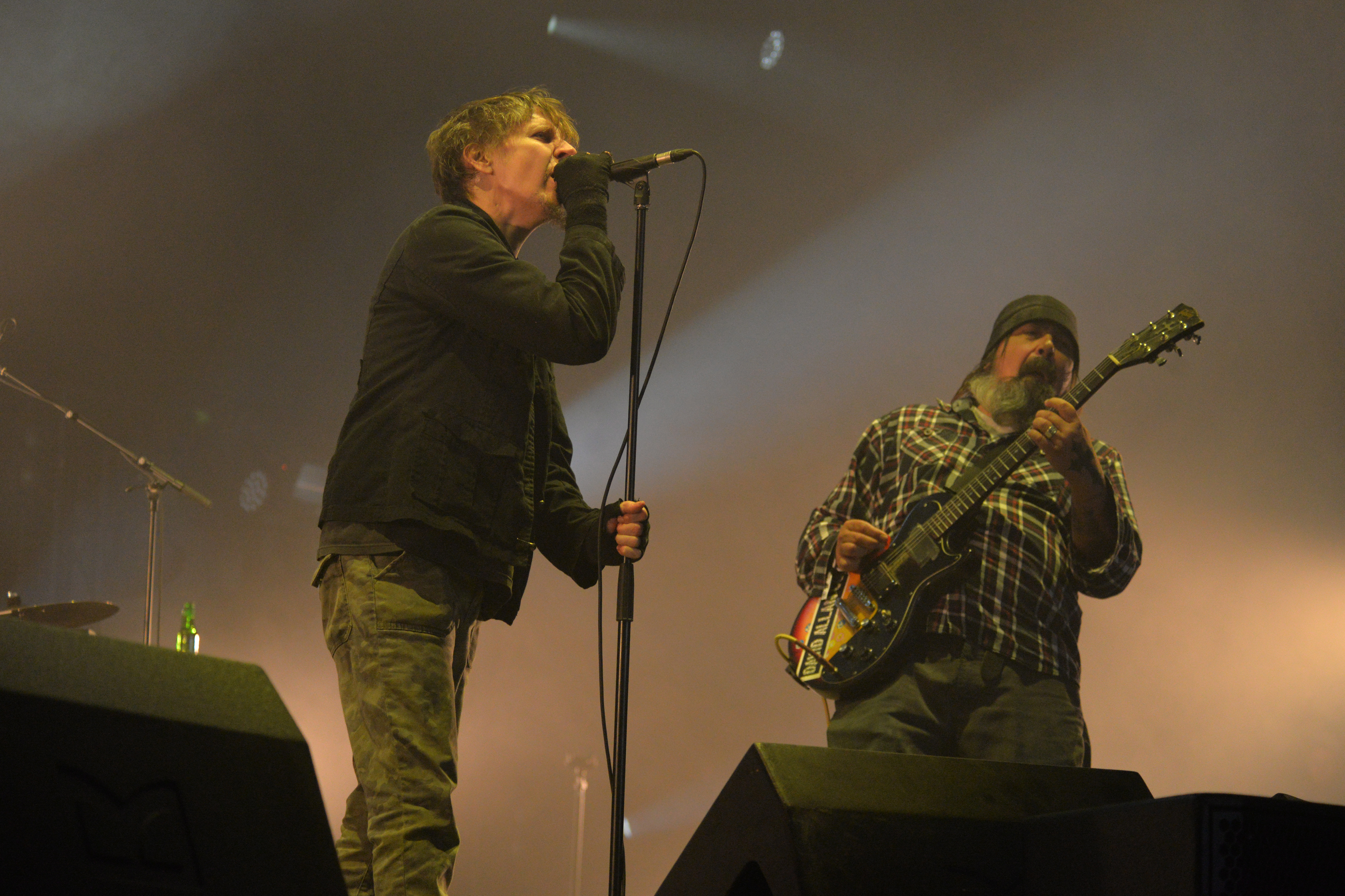 Concert du groupe américain EyeHateGod, Hellfest 2018.